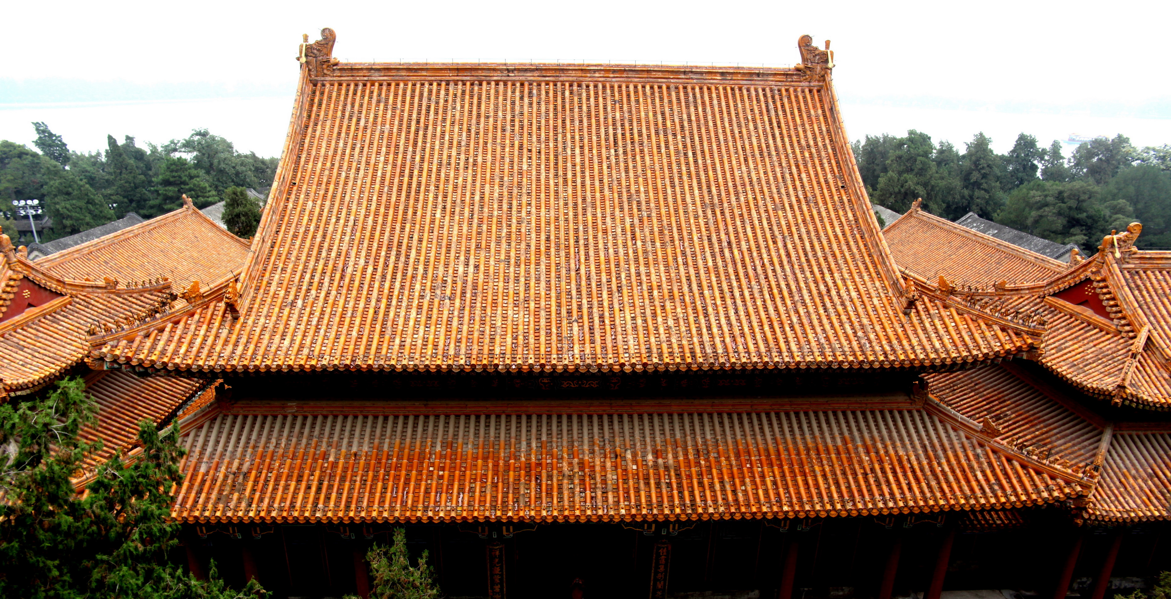 颐和园排云殿琉璃瓦